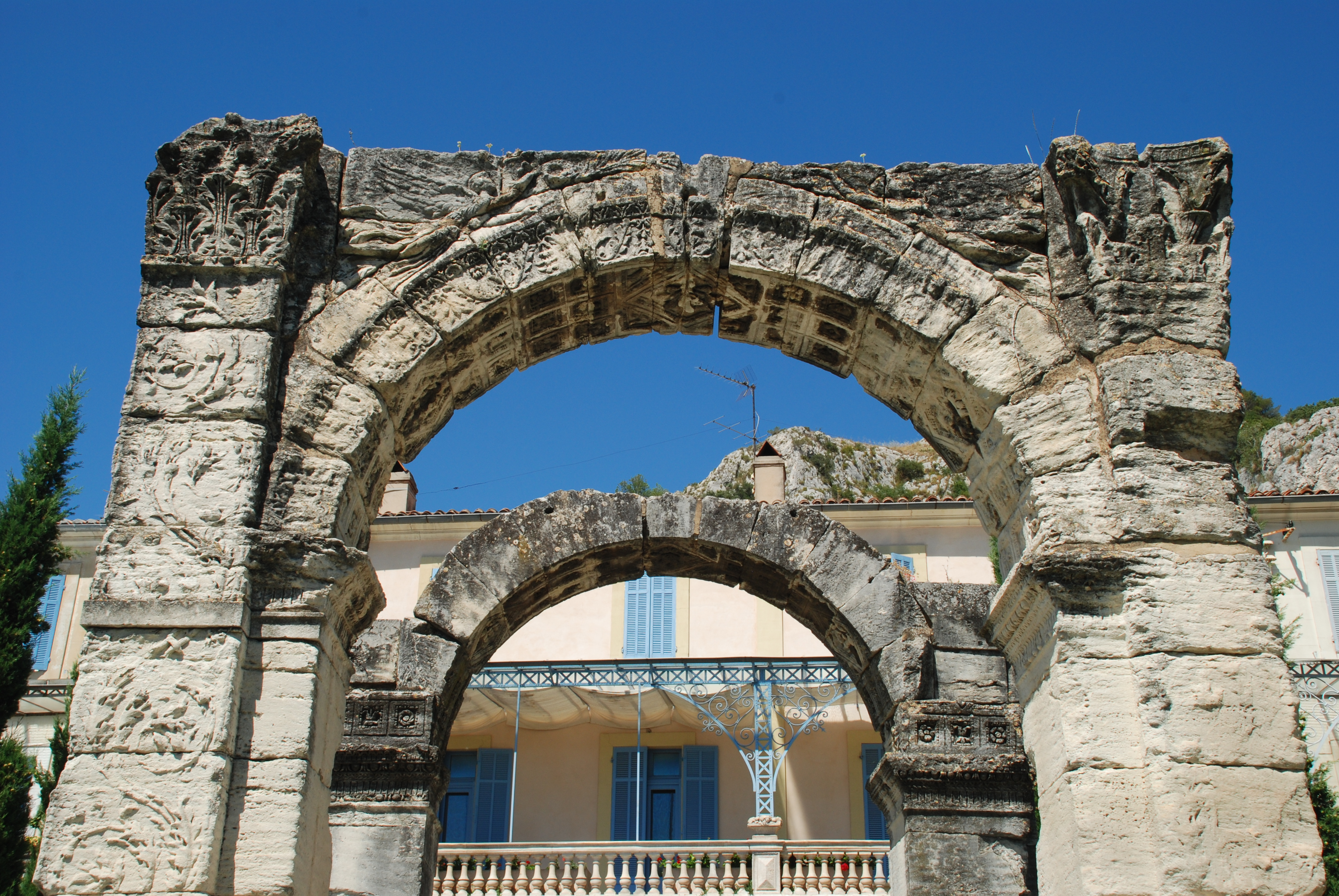 France - Provence - Arc romain de Cavaillon